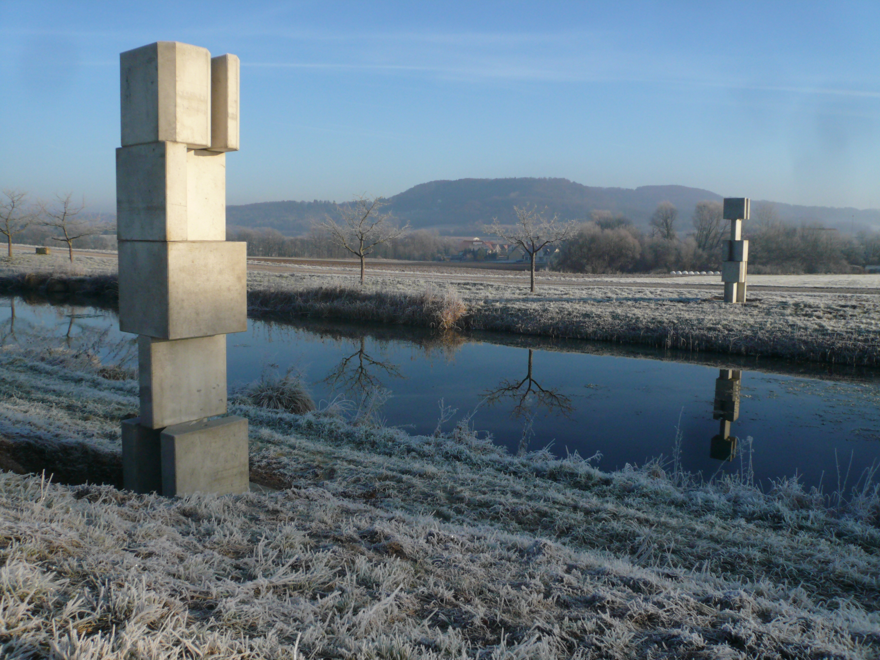 EINST STEIN von Timm Ulrichs am Ludwigkanal bei Berg i.d. OPf.